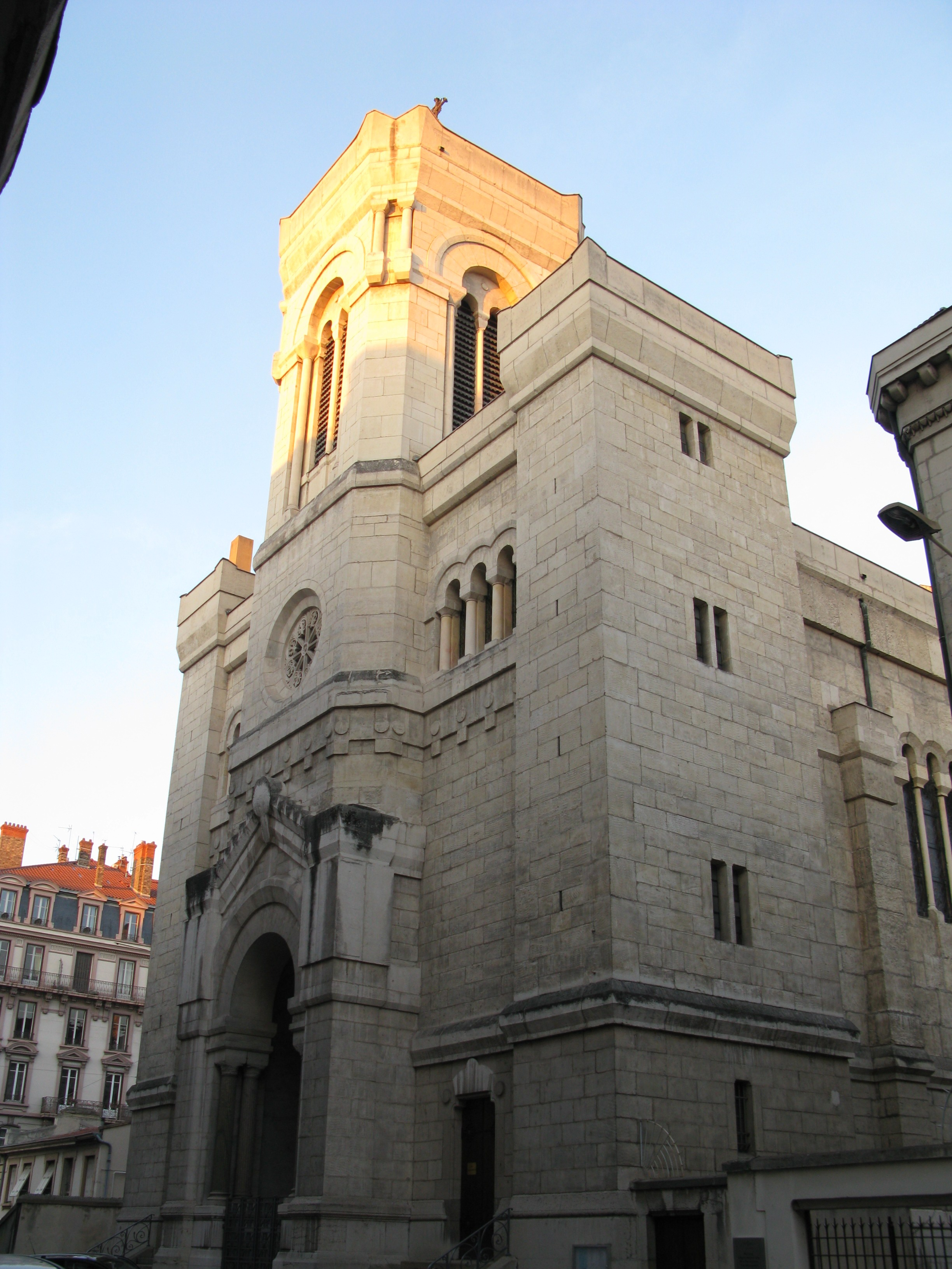 L'église de l'Immaculé Conception, 137 rue Pierre Corneille à Lyon.